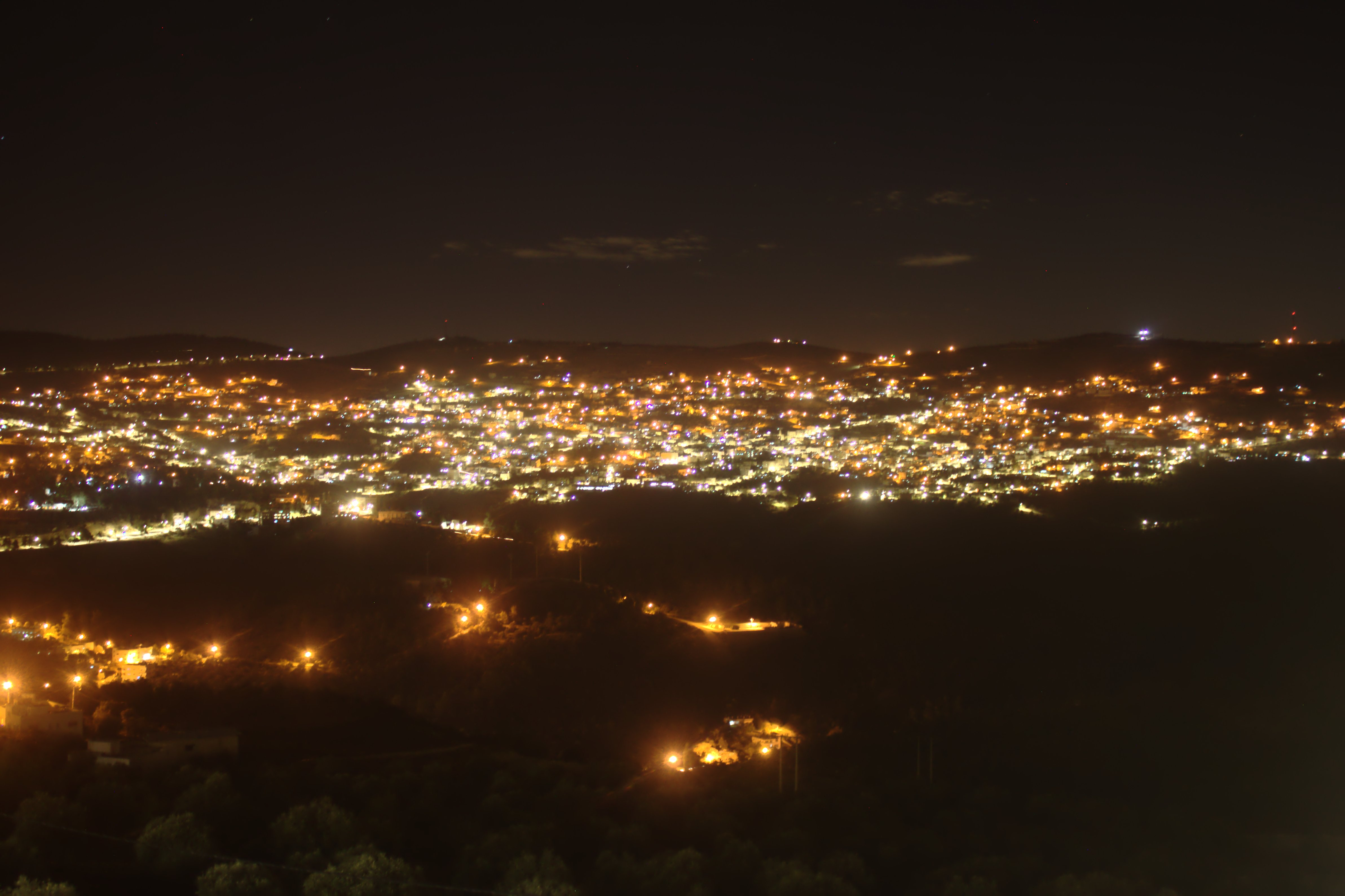 Město v noci ve městě Anžara, Jordánsko